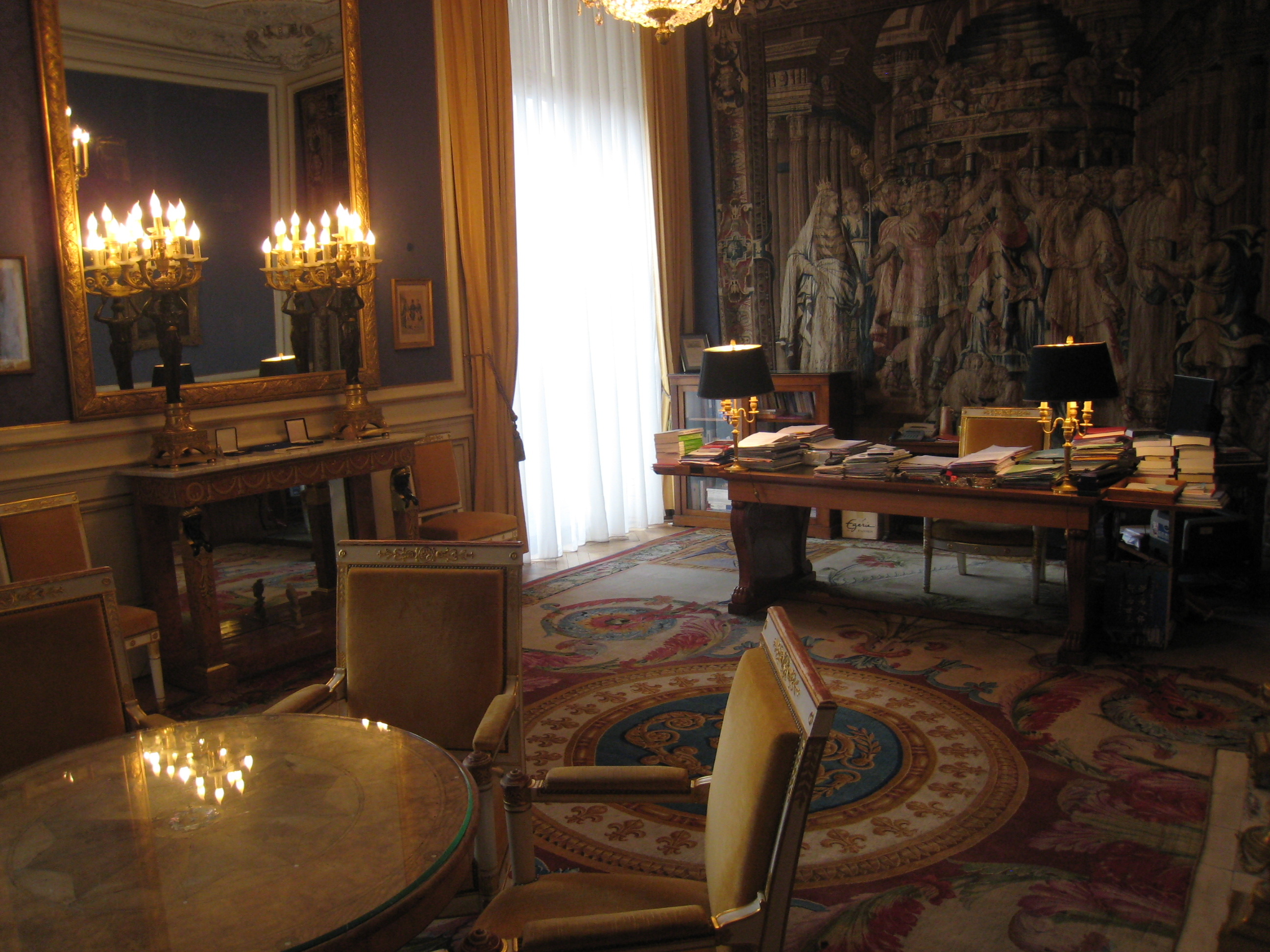 Conseil d'État, bureau du vice-président (Journées du Patrimoine 2009)